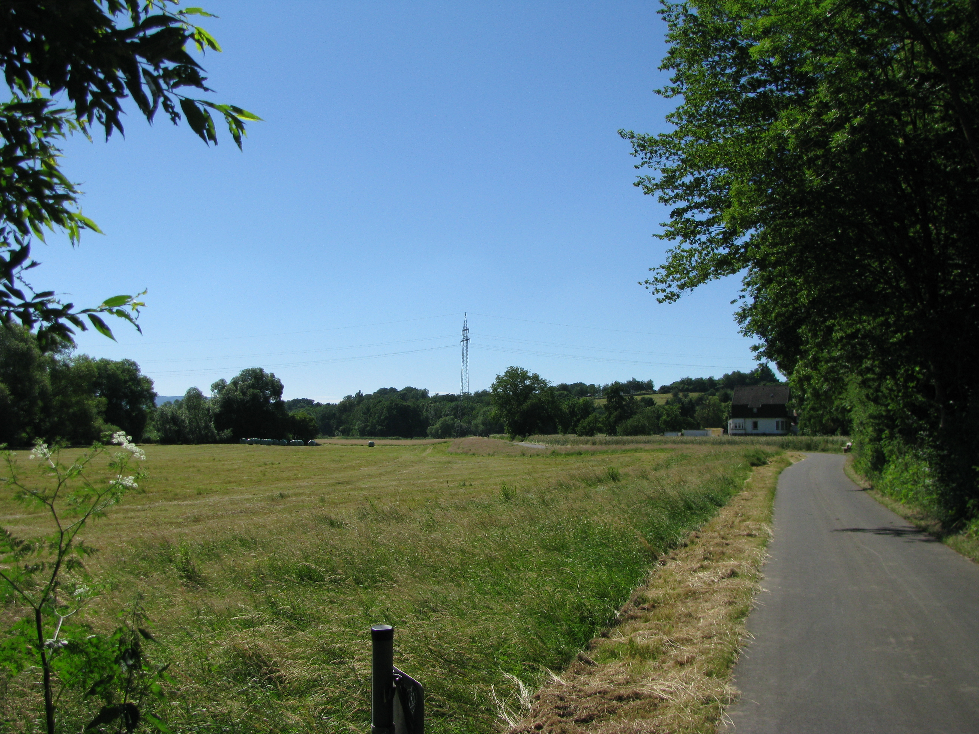 Blick in die Fuldaniederung östlich Wolfsanger in Richtung Westen